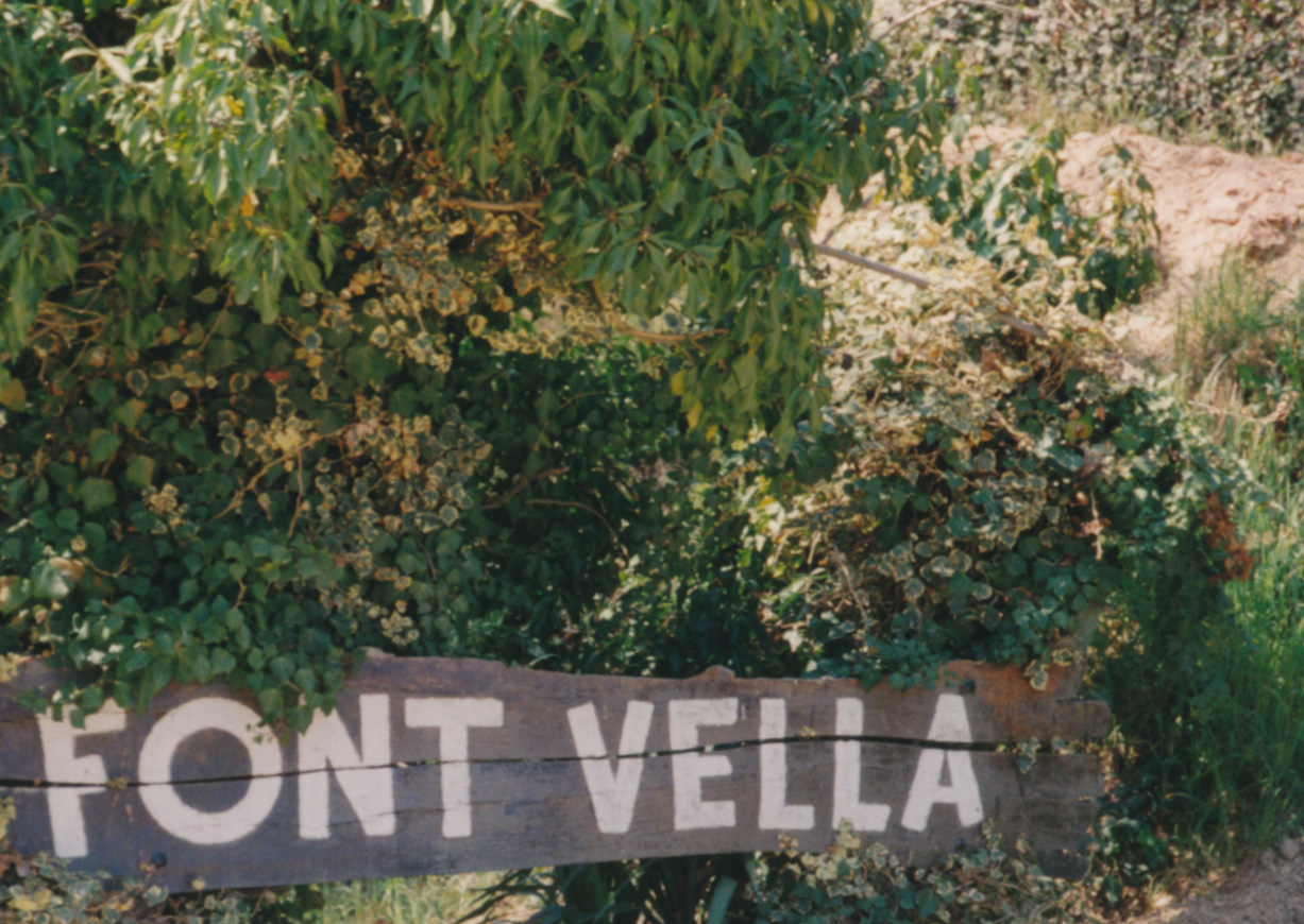 Hinweistafel der Quelle "Font Vella" in Sant Hilari Sacalm (Katalonien/Spanien) Datum: 14.04.1995 Urheber: M. Pfeiffer alias Gordito1869 Quelle: privates Fotoarchiv des Urhebers